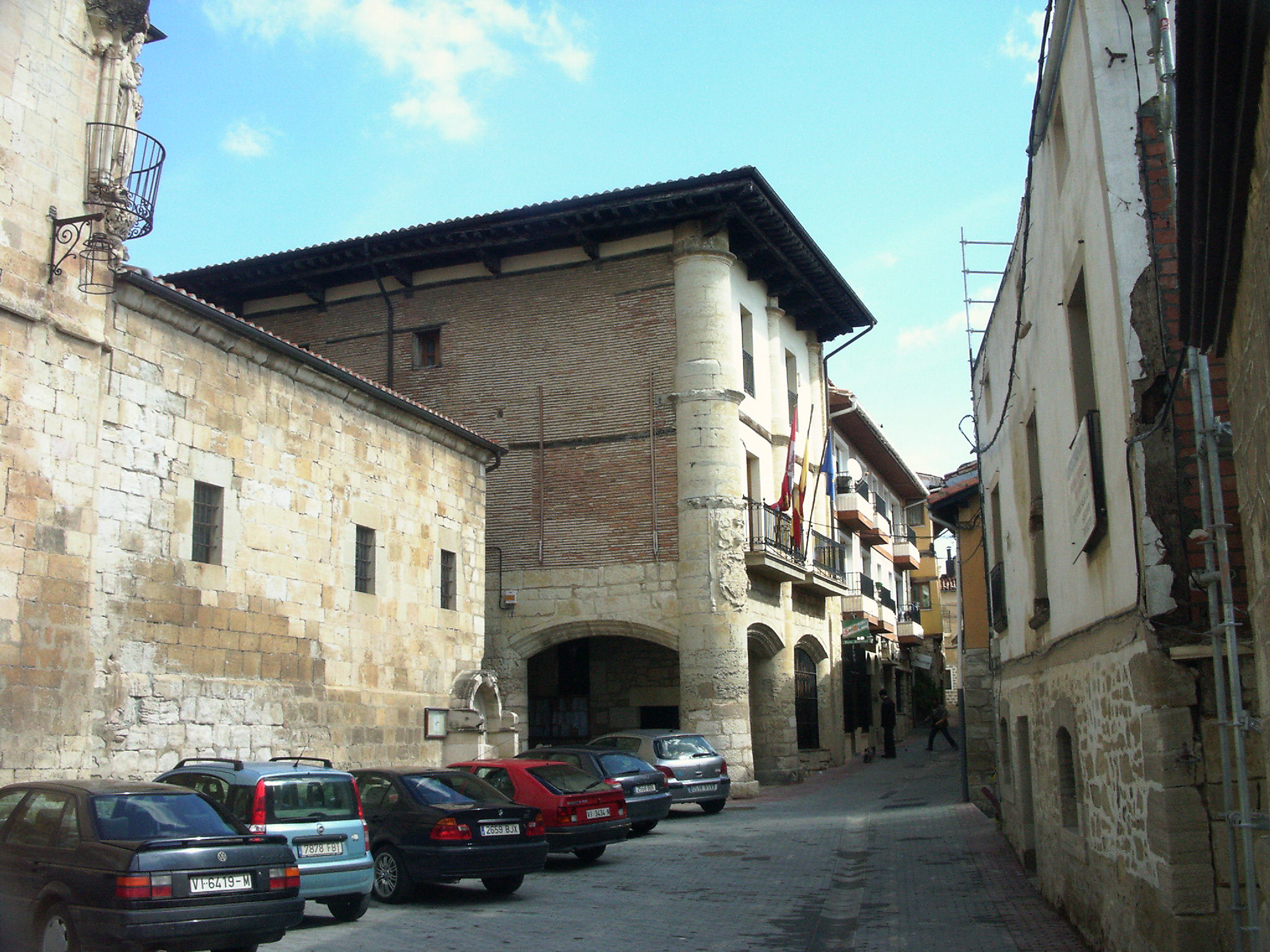 Trebiñuko udaletxea.